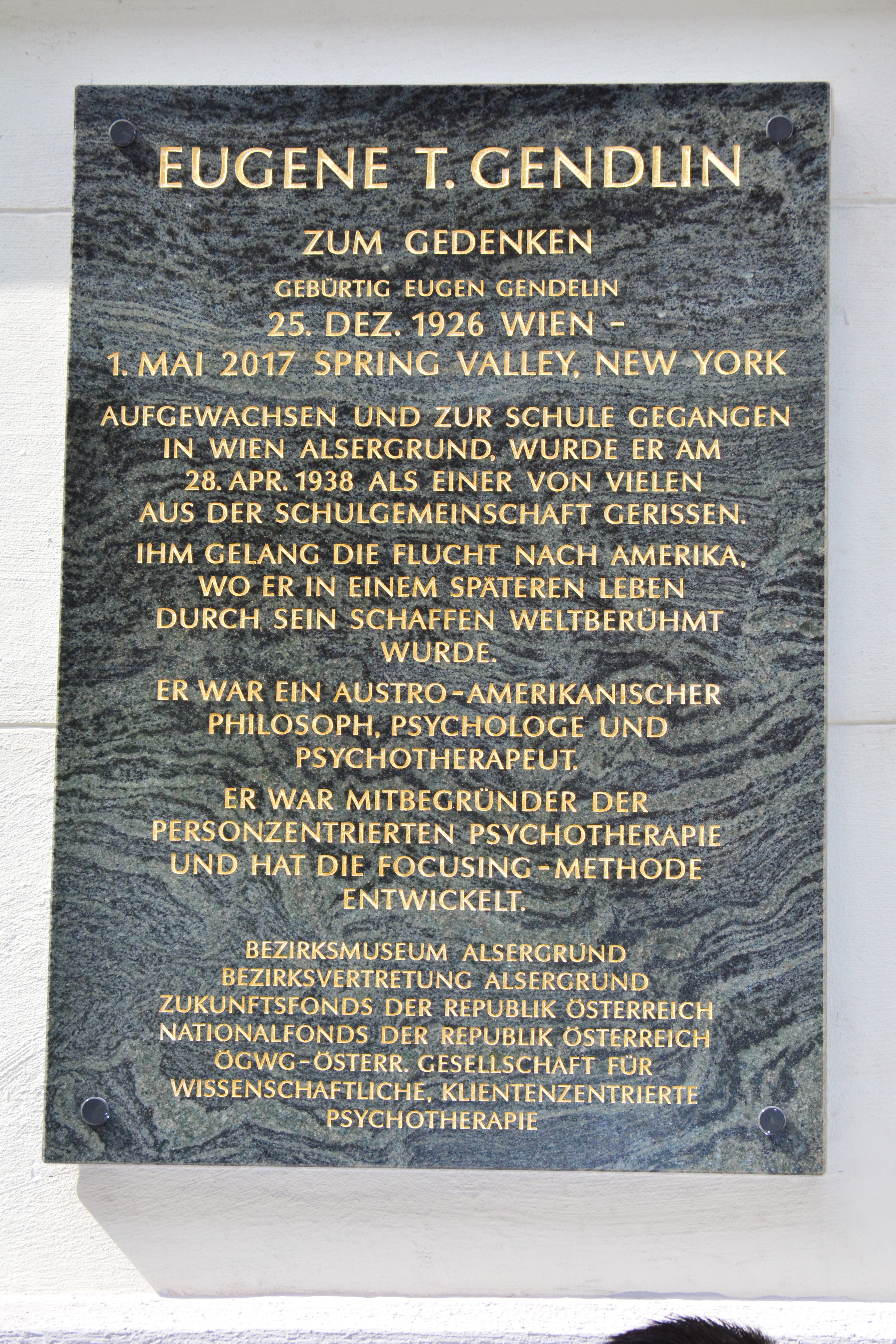 Gedenktafel für NS-Opfer (Wien, Glasergasse 25, Eugen T. Gendlin), enthüllt 2018-05-02